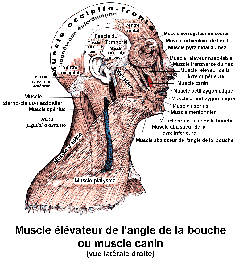 Muscle canin ou muscle élévateur de l'angle de la bouche. Anatomie humaine